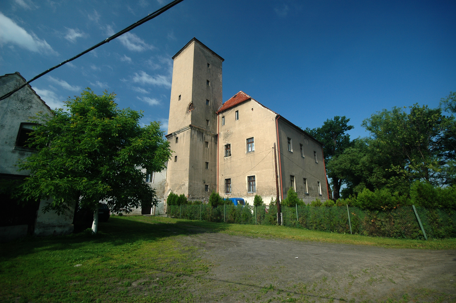 pałac Kantorowice, Lewin Brzeski 01.1964.